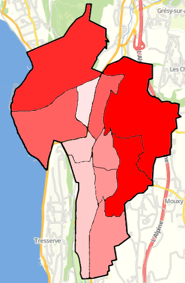 Carte des quartiers d'Aix-les-Bains colorés en fonction de leur revenu disponible médian par UC en 2014. Blanc rosé : ⩾ 15 000 € Rose clair : ⩾ 17 000 € Rose : ⩾ 19 000 € Rouge clair : ⩾ 21 000 € Rouge modéré : ⩾ 23 000 € Rouge renforcé : ⩾ 25 000 € This map may be incomplete, and may contain errors. Don't rely solely on it for navigation.